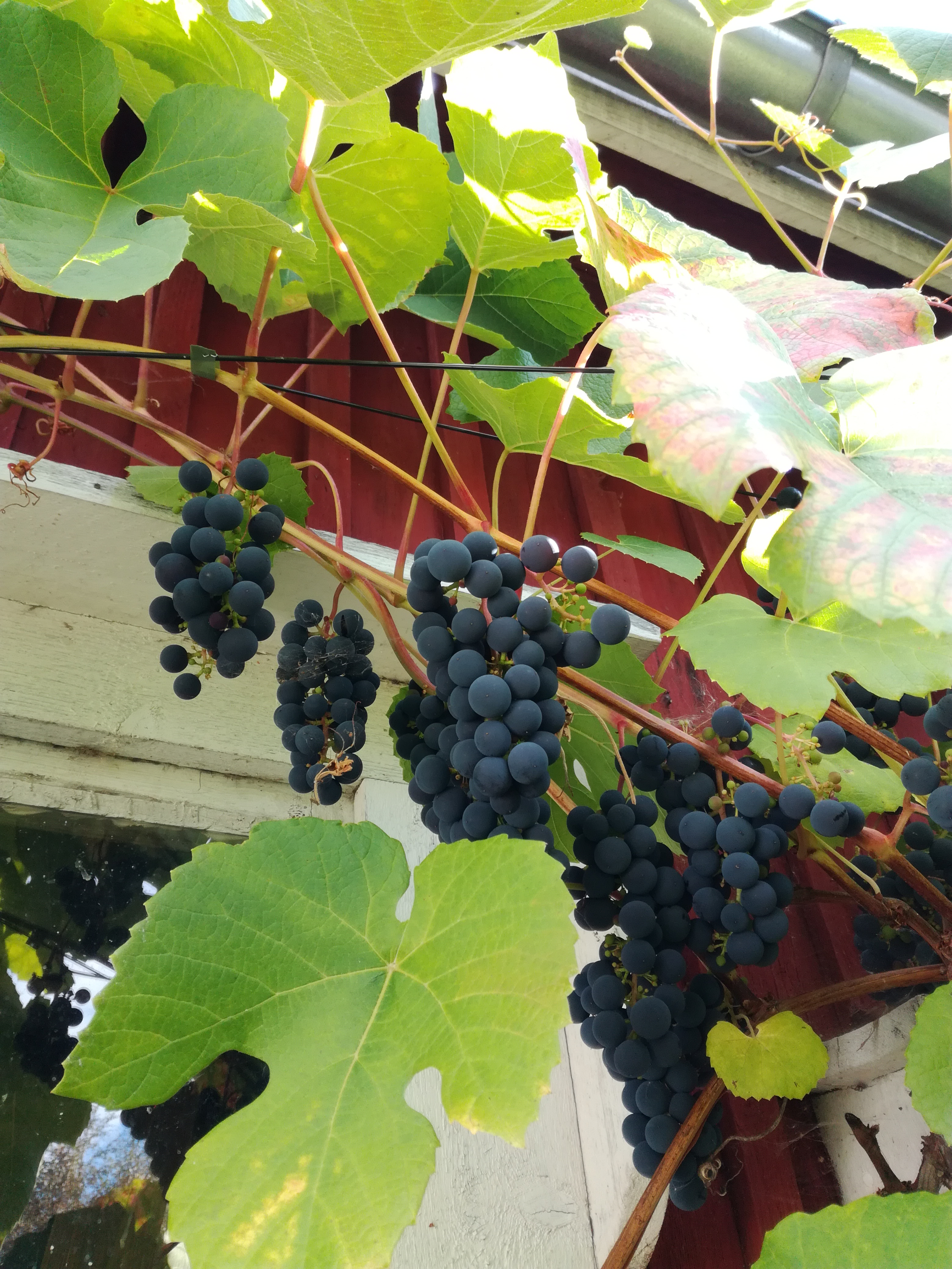 Vitis Labruscana-ryhmä 'Zilga'